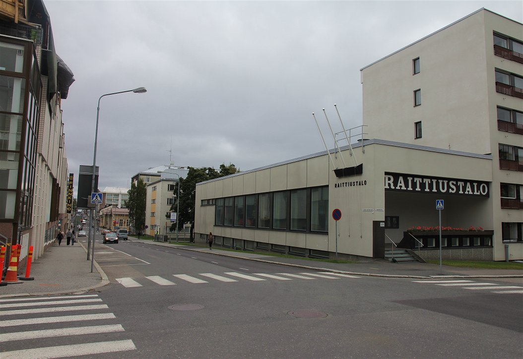 Minna Canthin katu Savonkadun risteyksen kohdalta nähtynä. kadun vasemmanpuoleinen reuna on Kuopion Multimäen ja oikeanpuoleinen Kuopionlahden kaupunginosaa